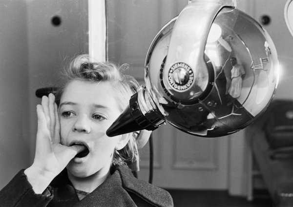 Portrait eines Kindes beim Röntgen